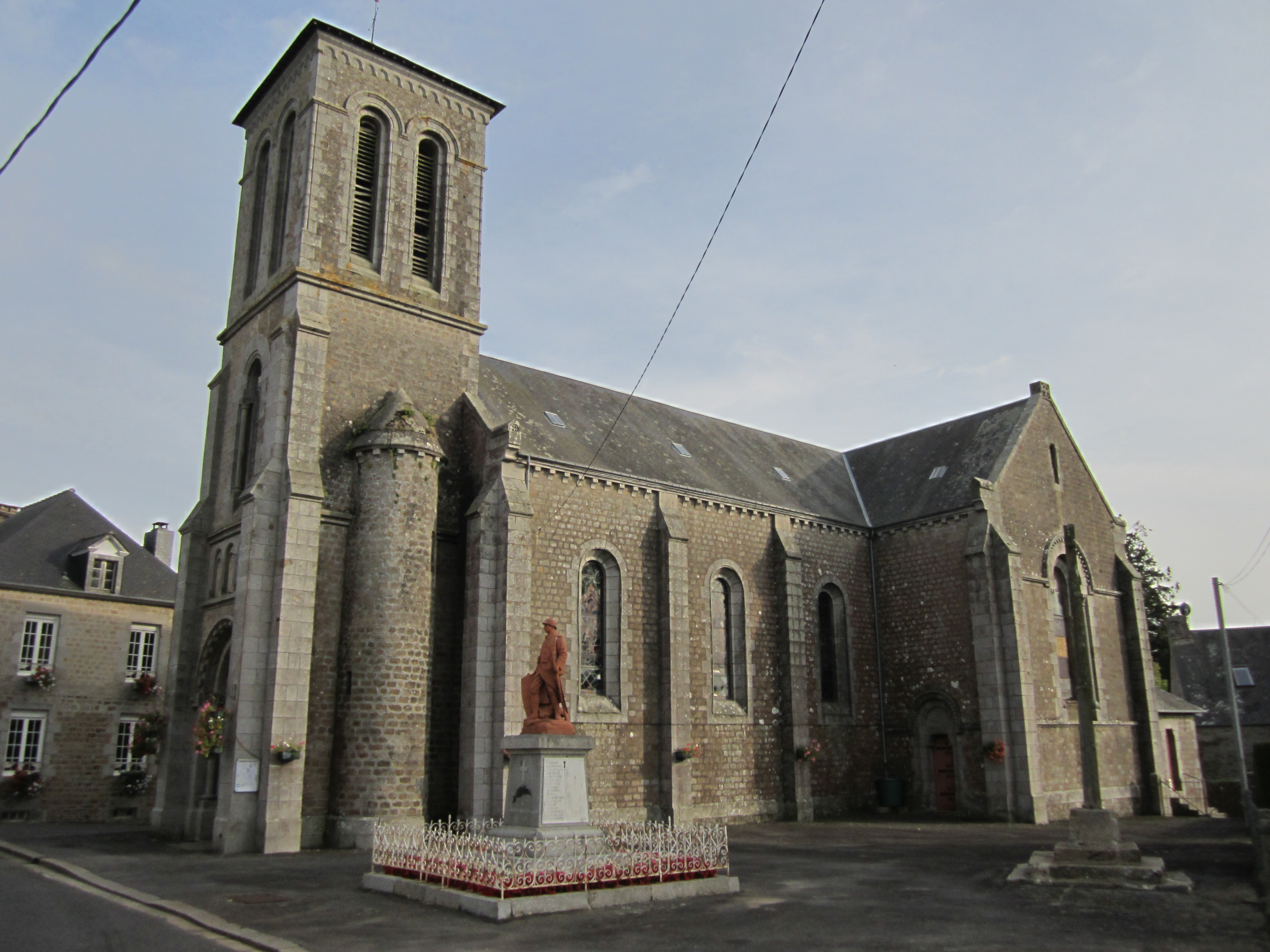 Heussé, Manche